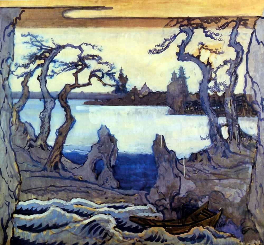 Эскиз декорации к «Соловью» И.Стравинского. 1914